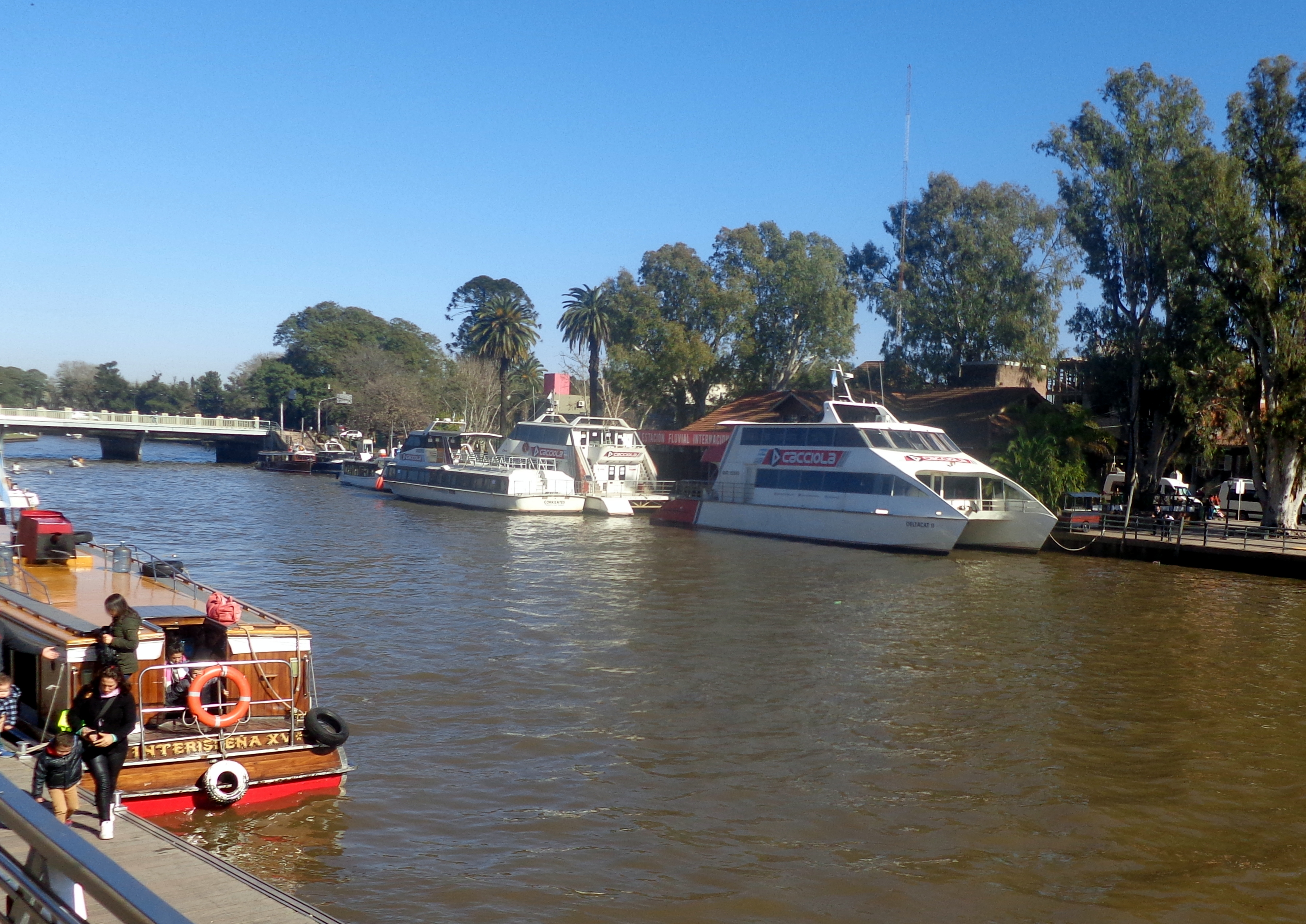 Estación fluvial de pasajeros Domingo Faustino Sarmiento, sobre el Río Tigre, en Tigre, provincia de Buenos Aires, Argentina.